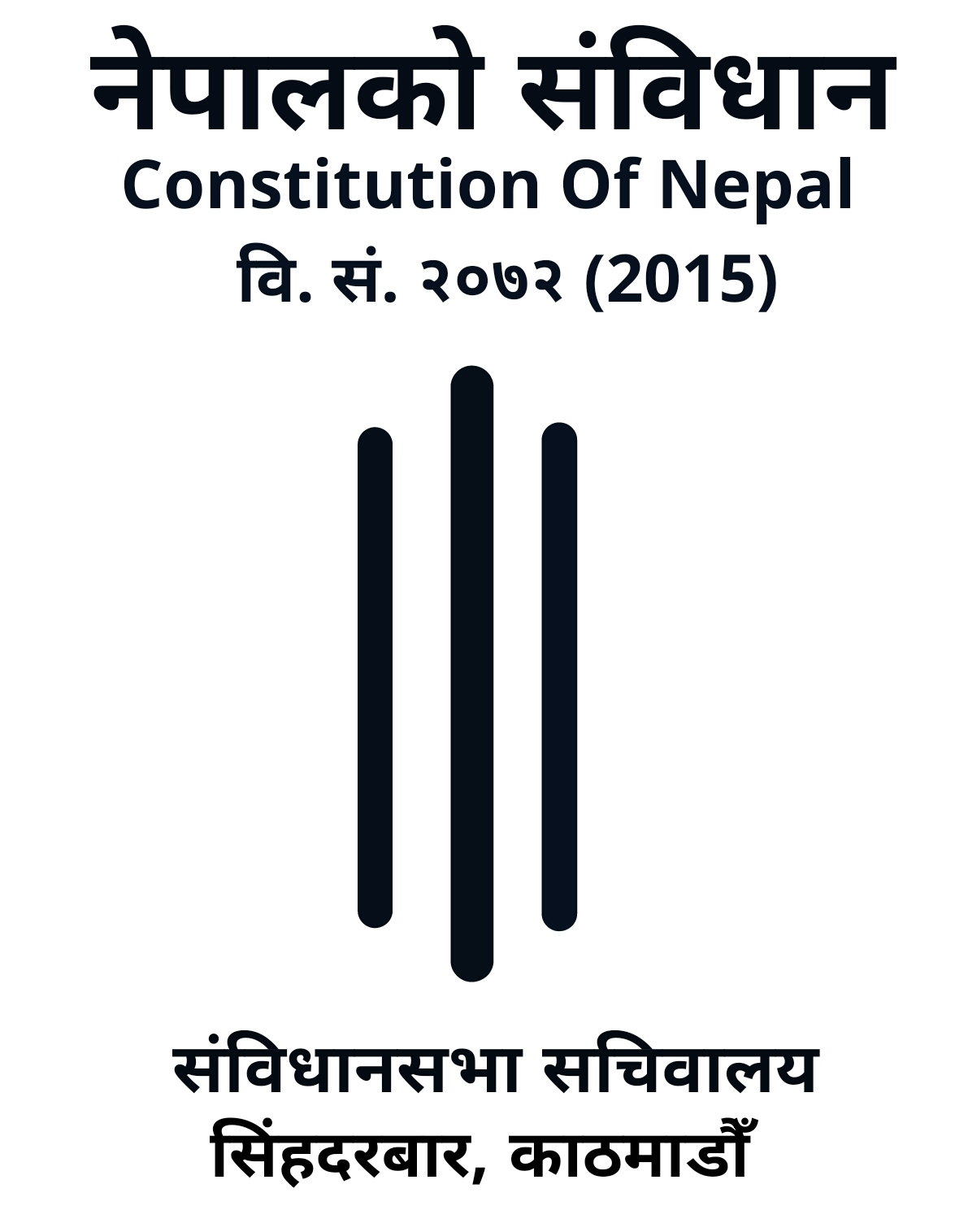 नेपाली: नेपालको संविधान